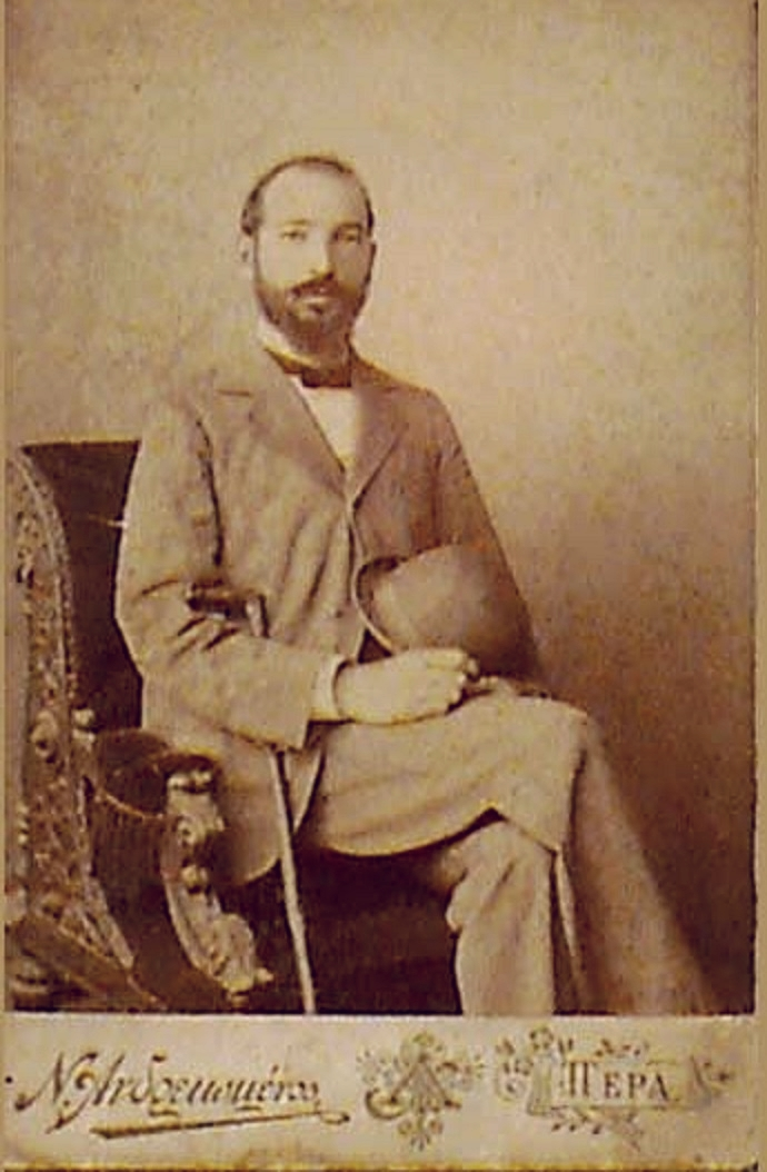 Ιωάννης Σιώτης, Ιατρός, 1896, Κωνσταντινούπολη